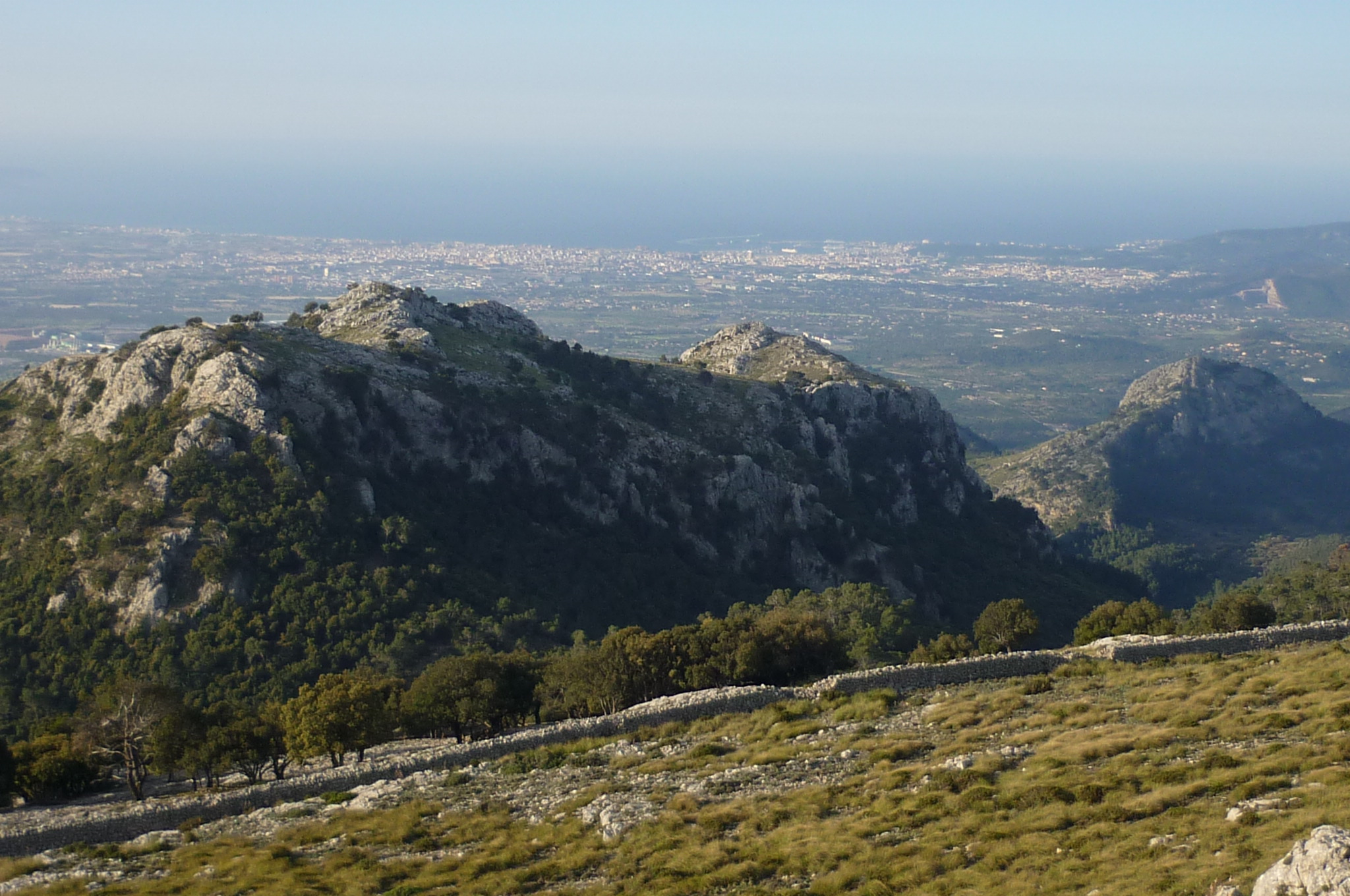 Blick vom Puig del Teix nach Palma auf der Insel Mallorca